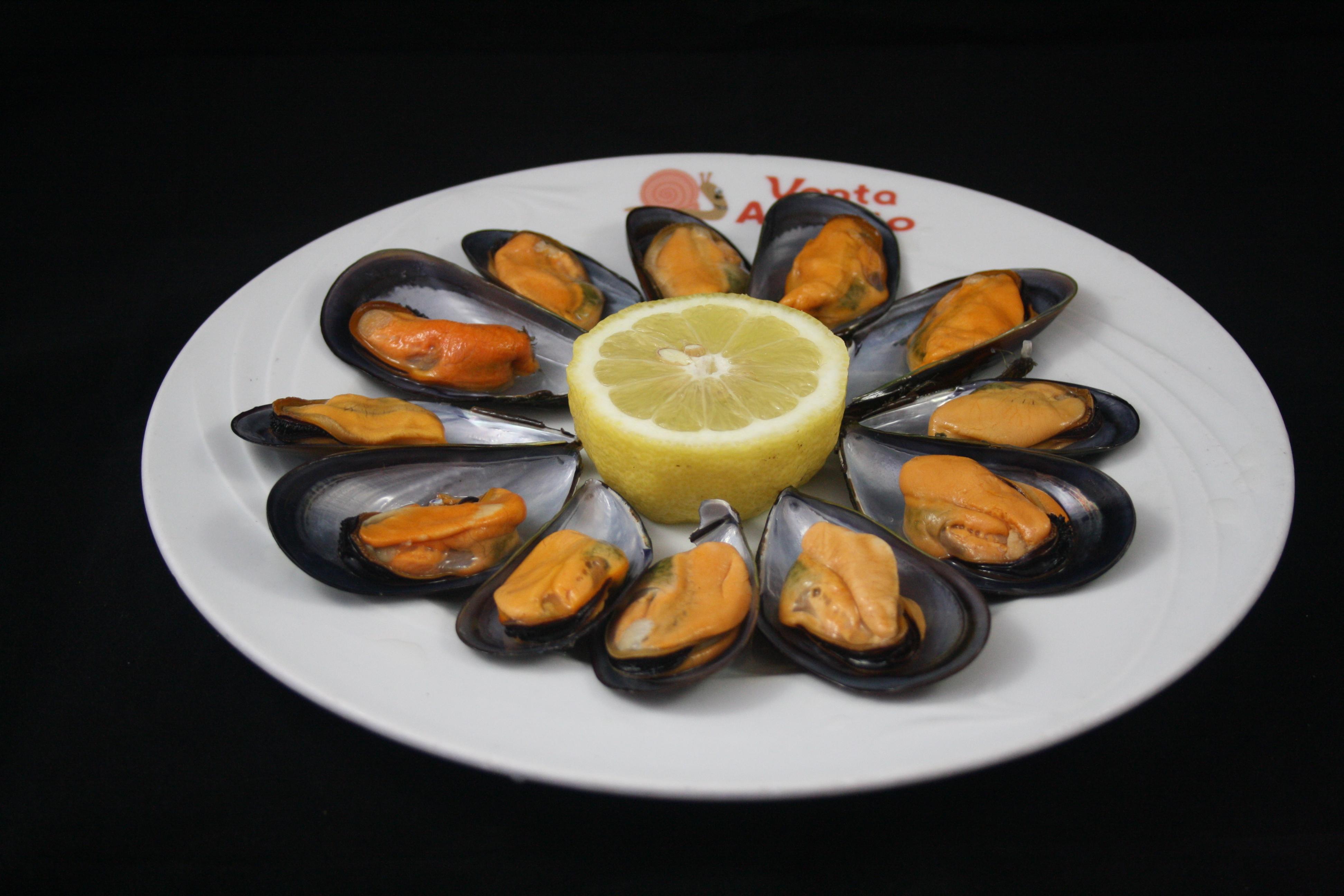 Mejillones al vapor. Venta Aurelio